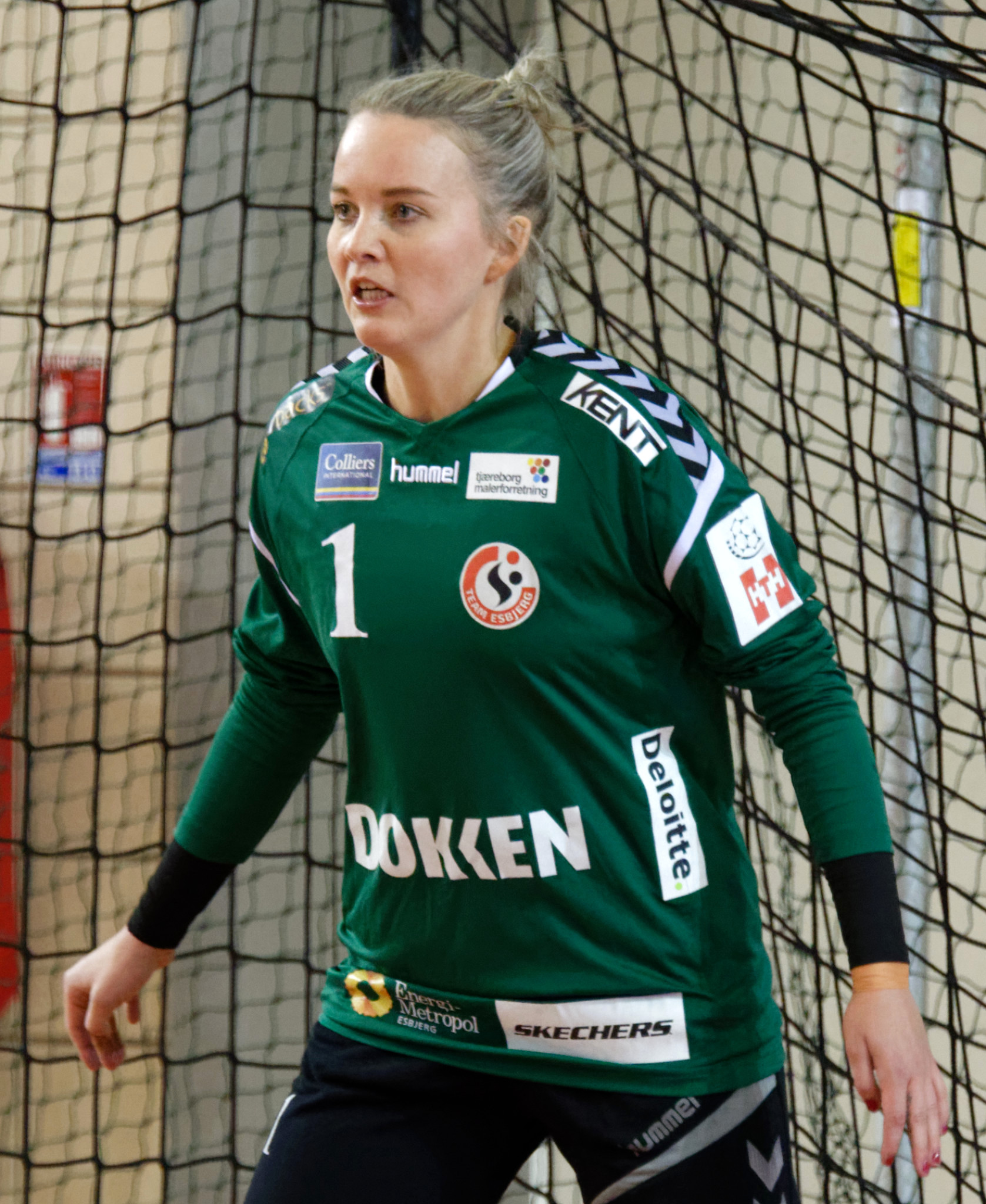 Lors de la rencontre du 3e tour de la Coupe EHF entre Paris 92 et les danoises de Team Esbjerg. A Issy les moulineaux, le 18 novembre 2018.